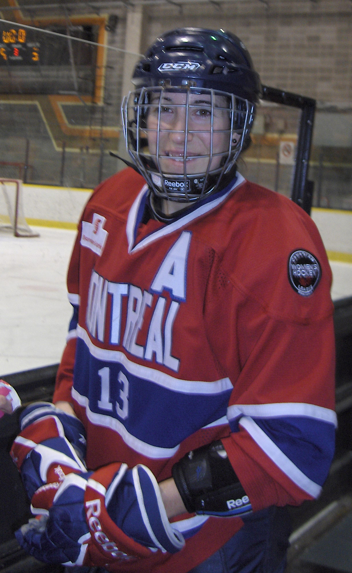 Joueuse des Stars